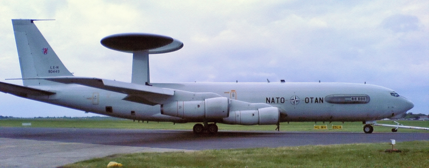 Bearbeitete Version von File:E3A-sentry.jpg durch --Liberaler Freimaurer (Diskussion) Original-Beschreibung: (Benutzer:Krause77) Summary E-3A Sentry (Original text: An E-3A Sentry aircraft - ILA 2006 / Germany) Foto: R. Krause (Benutzer: Krause77, eigenes Foto) Uploaded with Reworkhelper